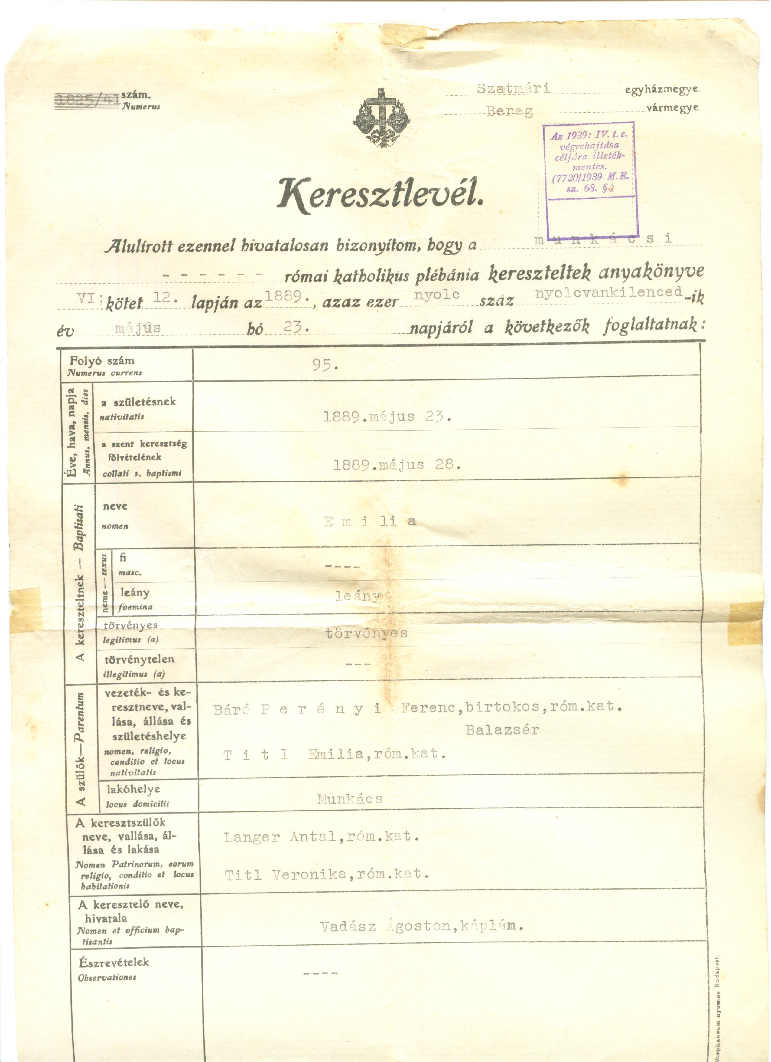 eredeti